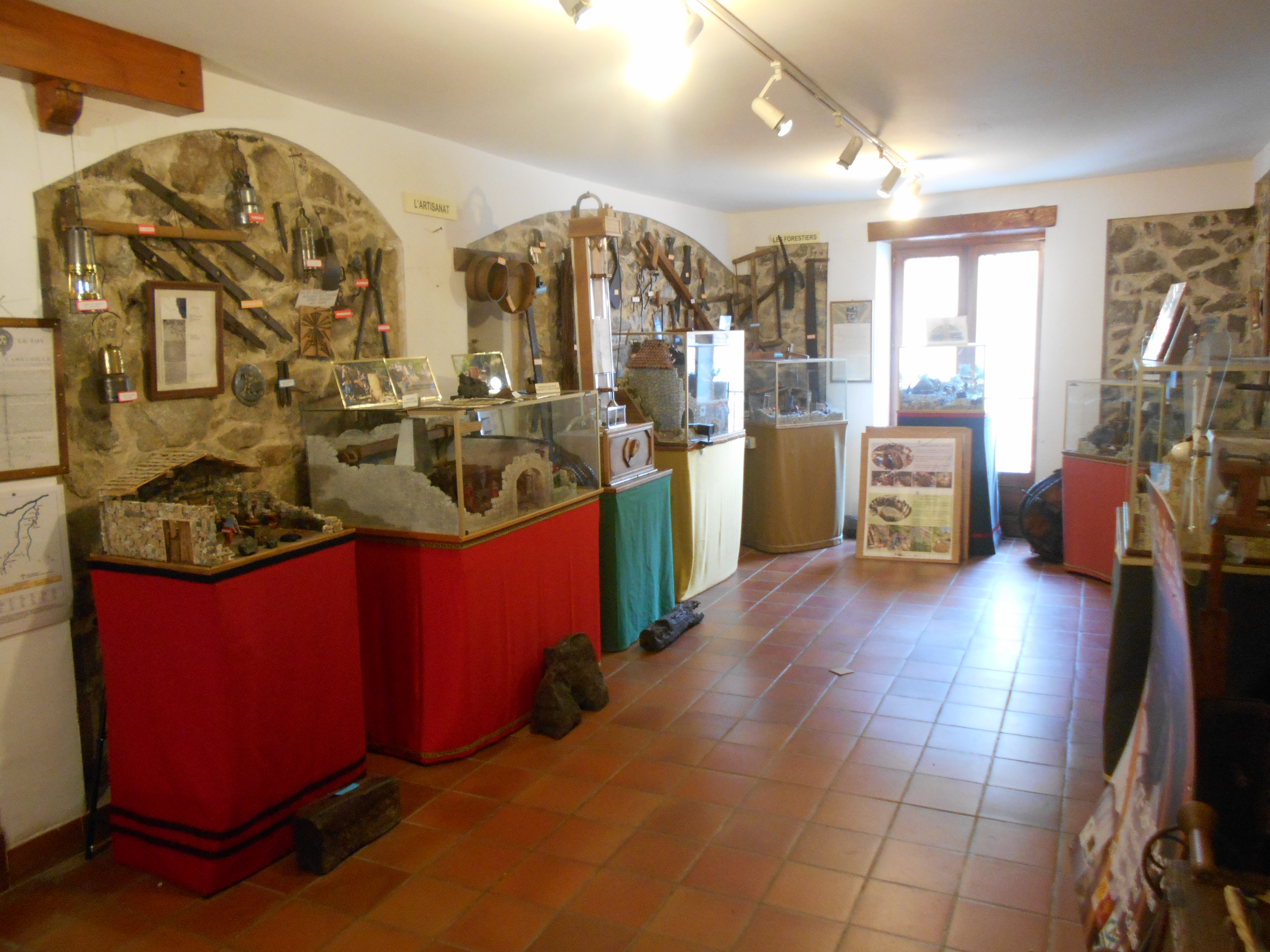 Museu de Serrallonga, al Vallespir